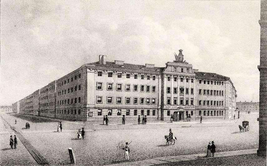 Kaserne des Kaiser Alexander-Grenadier-Regiments Nr. 1 in der Alexanderstraße 56 in Berlin (Lithografie). Die Kaserne wurde vor 1772 als Artilleriekaserne errichtet.